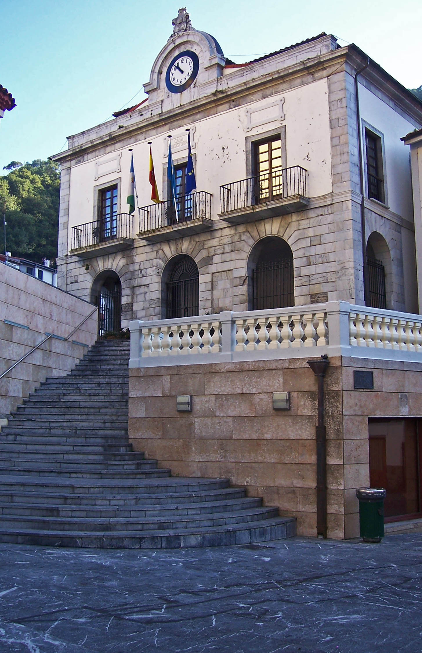 Cudillero es un concejo y parroquia del Principado de Asturias (España). Es un importante puerto pesquero. En la imagen, el edificio del Ayuntamiento.